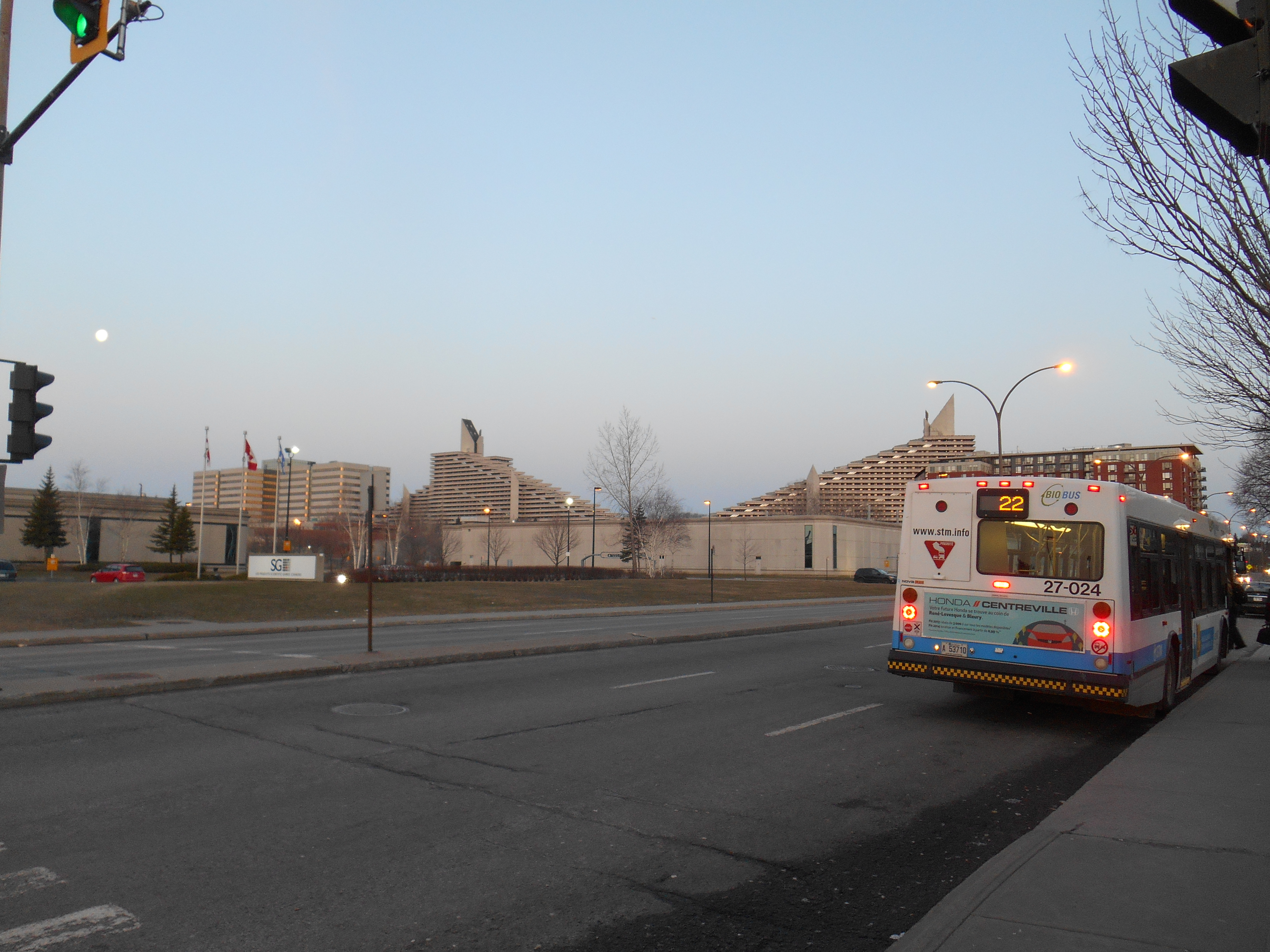 Boulevard de l'Assomption, Montréal, près de la station de métro, en regardant vers le nord On aperçoit, à l'horizon, les pyramides olympiques, rue Sherbrooke.